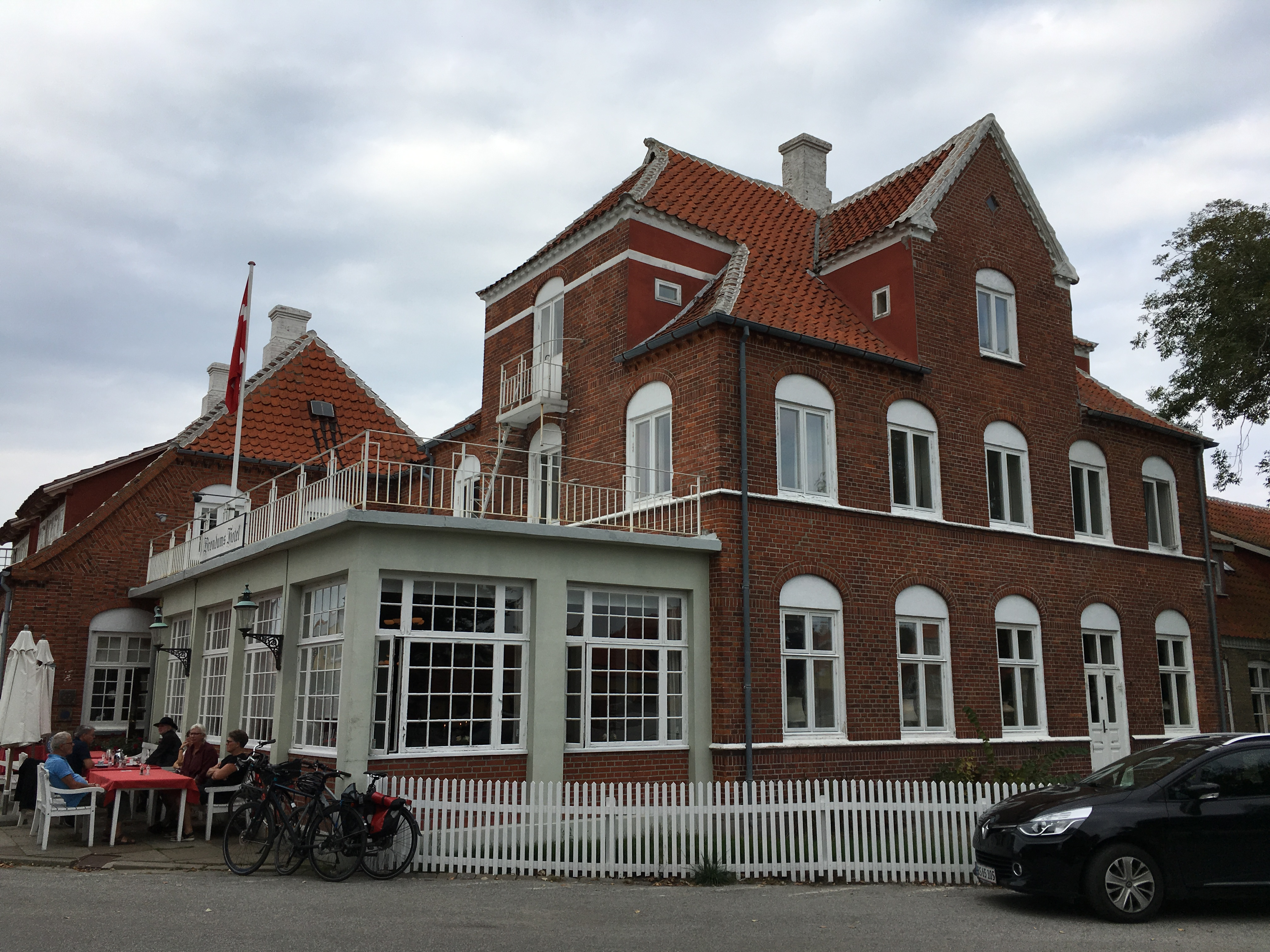 Et af de mest berømte hoteller i Skagen.